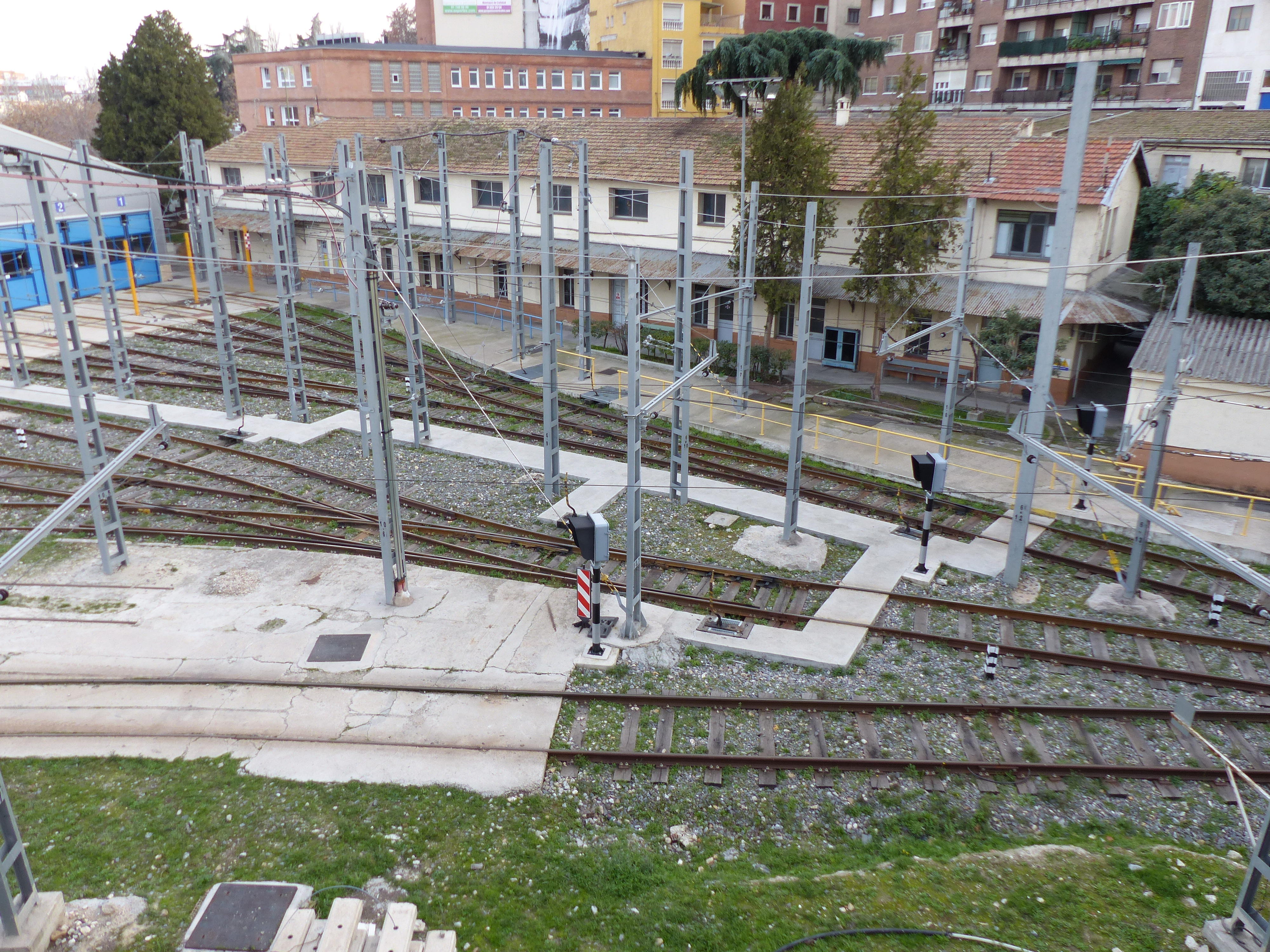 Depósito de Ventas